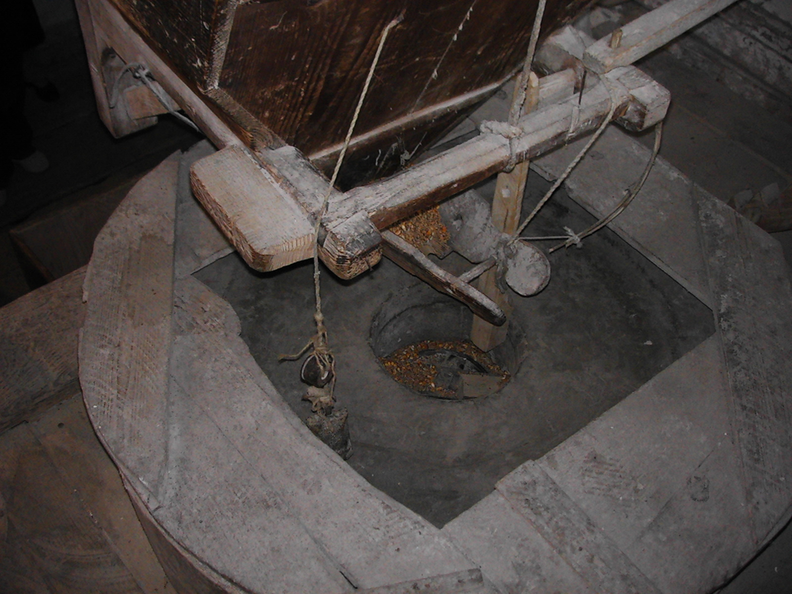 Malomkő Erdélyben